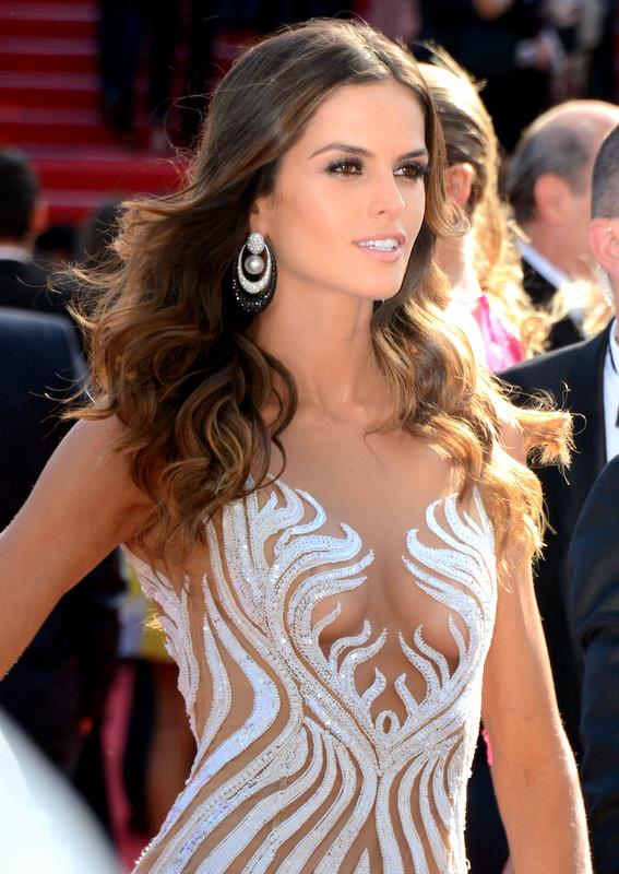 Izabel Goulart au festival de Cannes